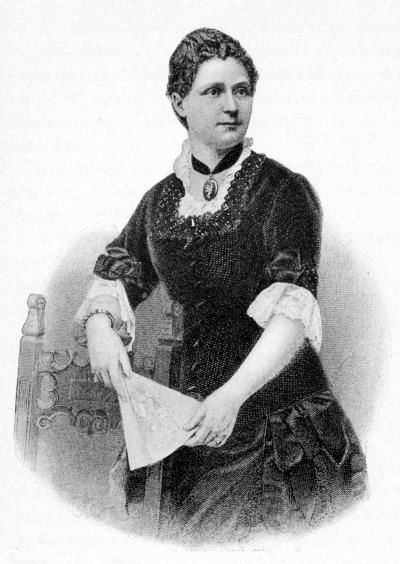 Louise Adolpha Le Beau. Según cita: "La presente imagen es de dominio público, es decir, su autor es desconocido, ha renunciado a sus derechos o su licencia ha prescrito, por lo que se puede usar libremente".